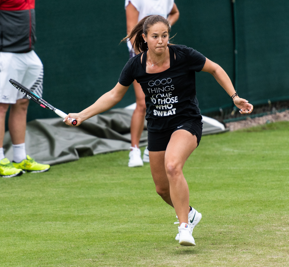 Daria Kasatkina